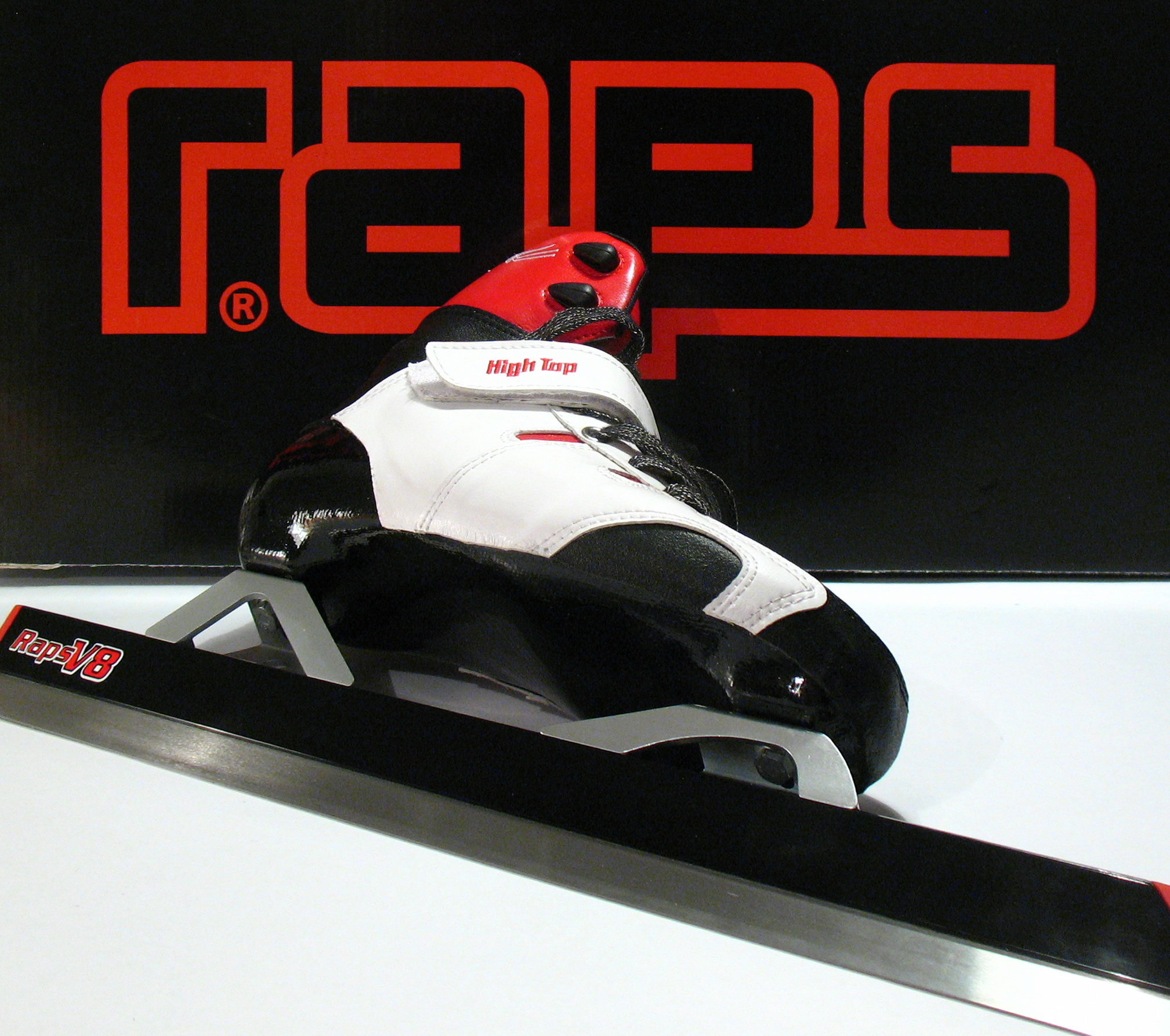 Touren-Eisschnelllaufschlittschuhe der Firma Raps